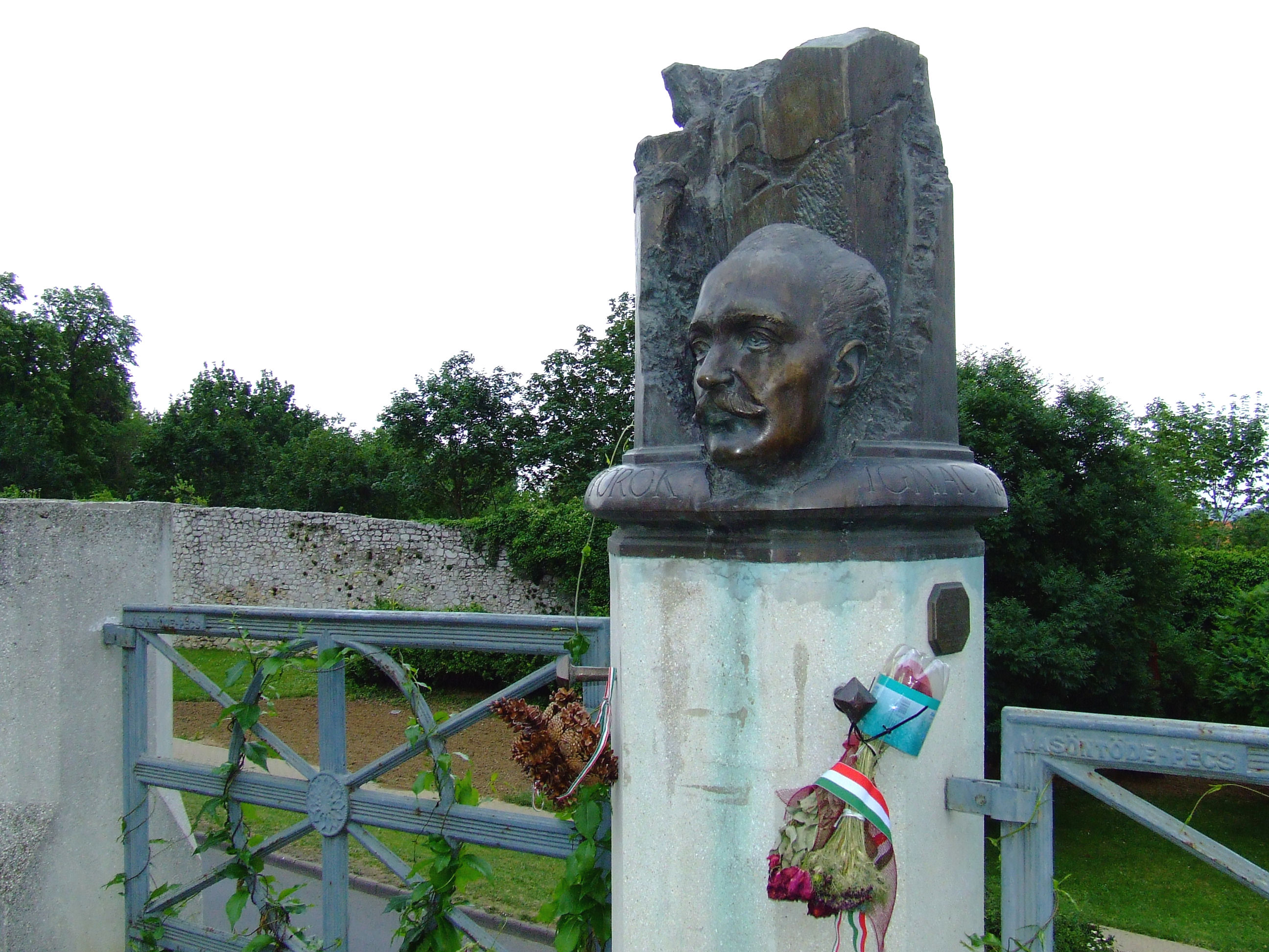 Török Ignác honvéd vezérőrnagy, aradi vértanú szobra Pécsen. Az OTP Baranya Megyei Igazgatósága adománya. Sütő Ferenc alkotása (1993)